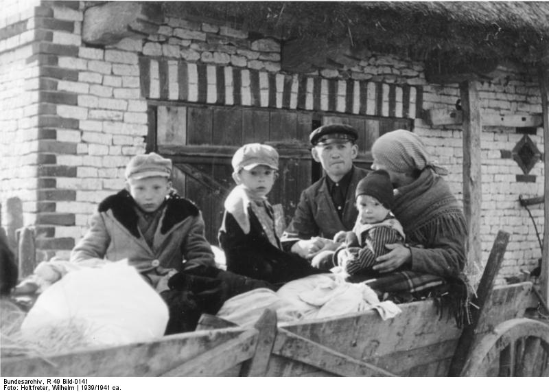 Polen verlassen auf Wagen das Gut Dombrowa